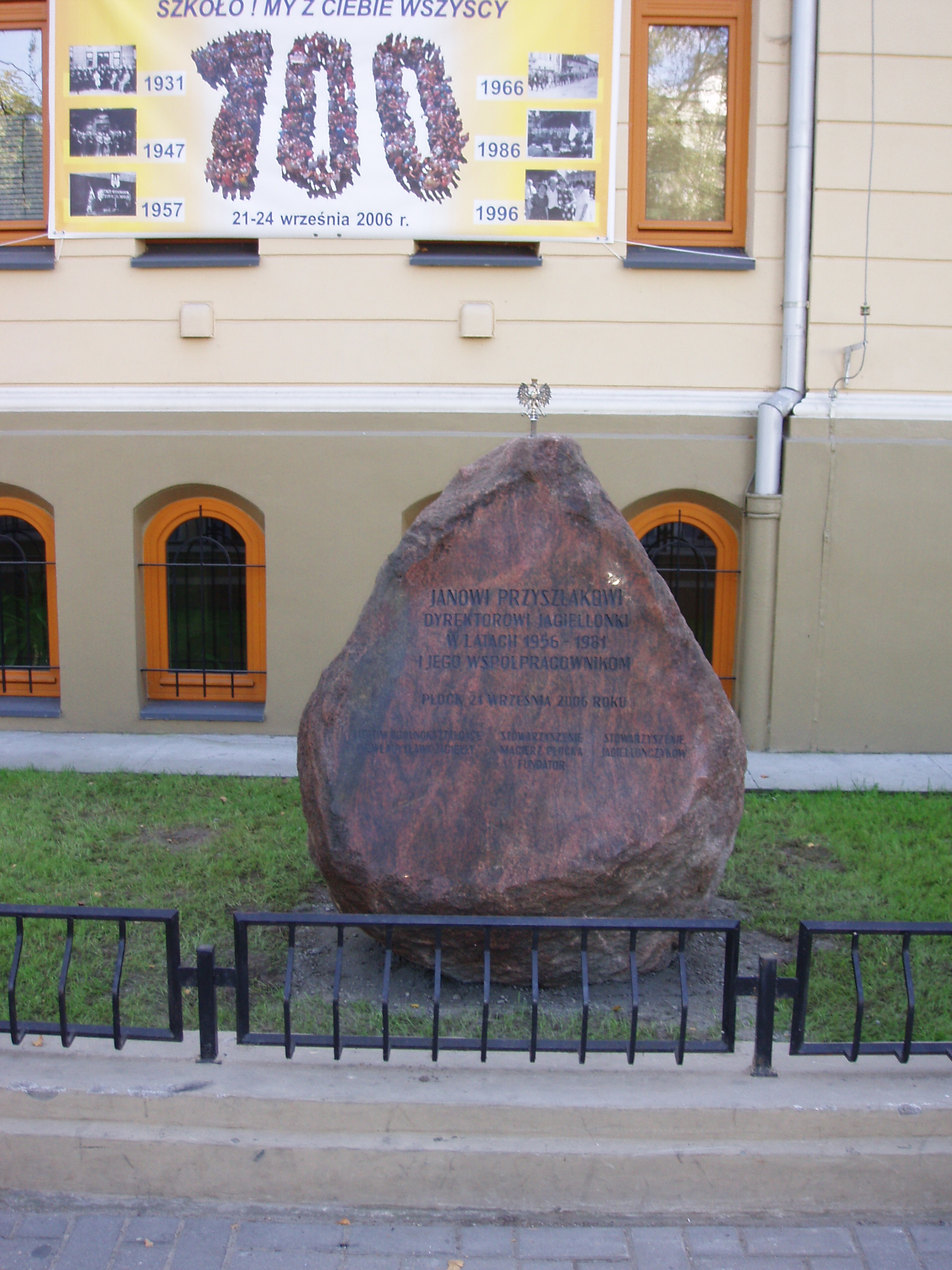 Kamień pamiątkowy dyr. J. Przyszlaka, Płock L.O. im. W Jagiełły